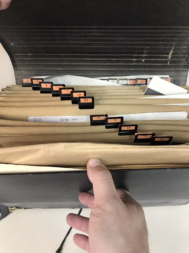 "תיקי חבצלת" במשרדי קול ישראל